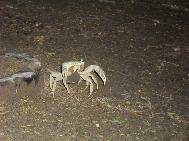 Cardisoma guanhumi en Paparo, estado Mirada - Venezuela